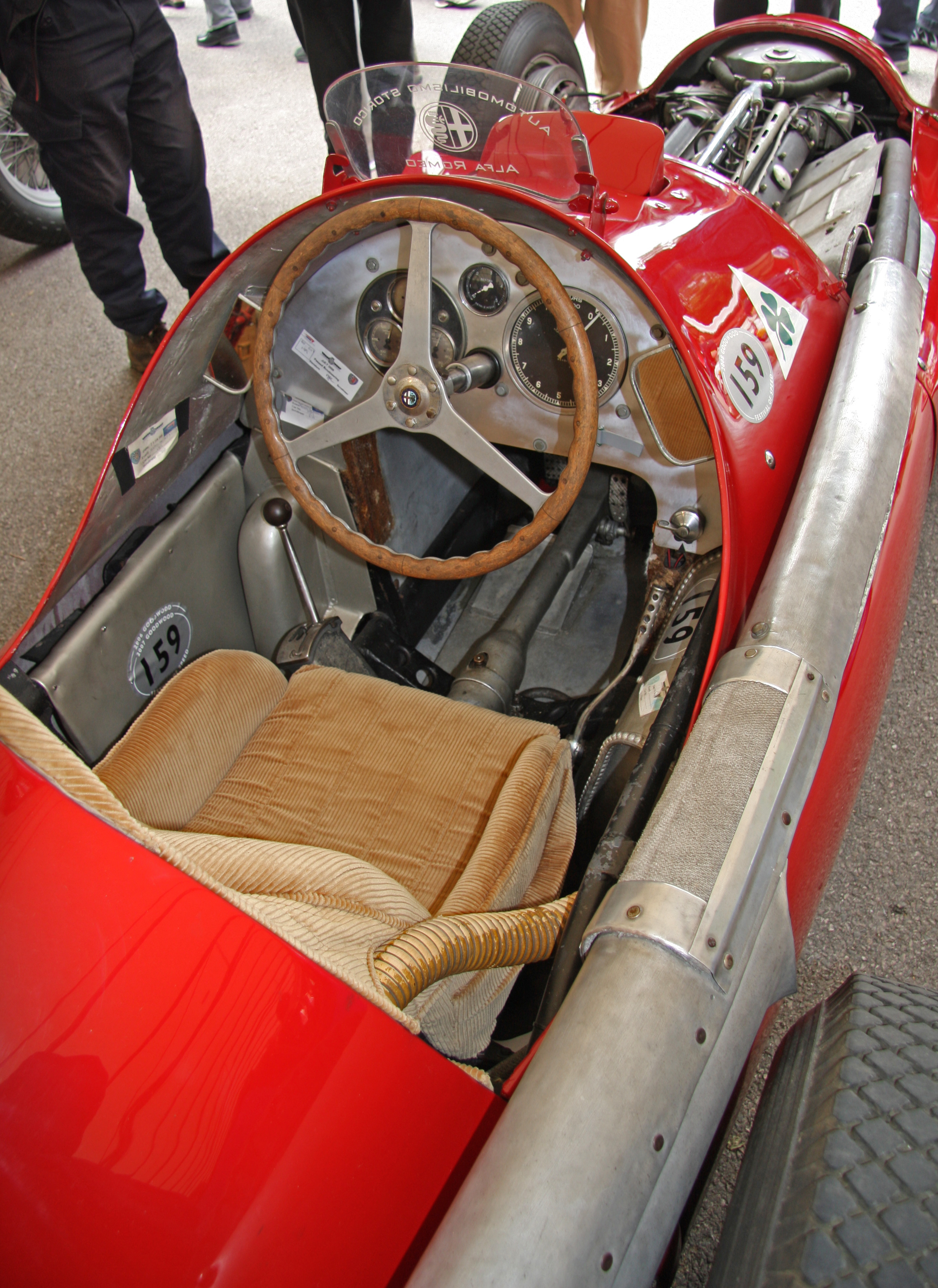 Built 1951. 1.5 litre 8 cylinder